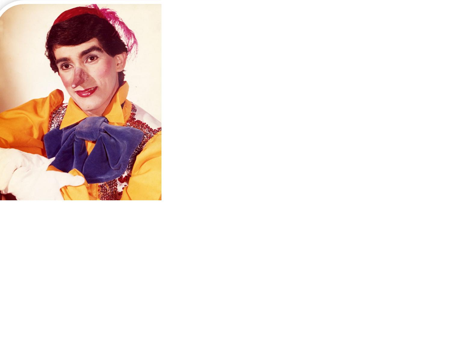 Pinocho hace 33 años